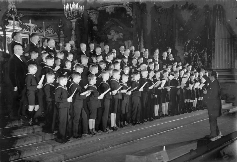 Der weltberühmte Berliner Dom-Chor bei einer Probe vor dem grossen Hauptaltar im Berliner Dom ! Wie die Peterskirche in Rom und die Notre Dame Kirche in Paris berühmte Kinderchöre unterhalten, hat auch der Berliner Dom einen in der ganzen Welt bekannten Knaben-Chor. Der Dirigent bei einer Probe mit den berühmten Sängerknaben des Berliner Dom-Chor´s.